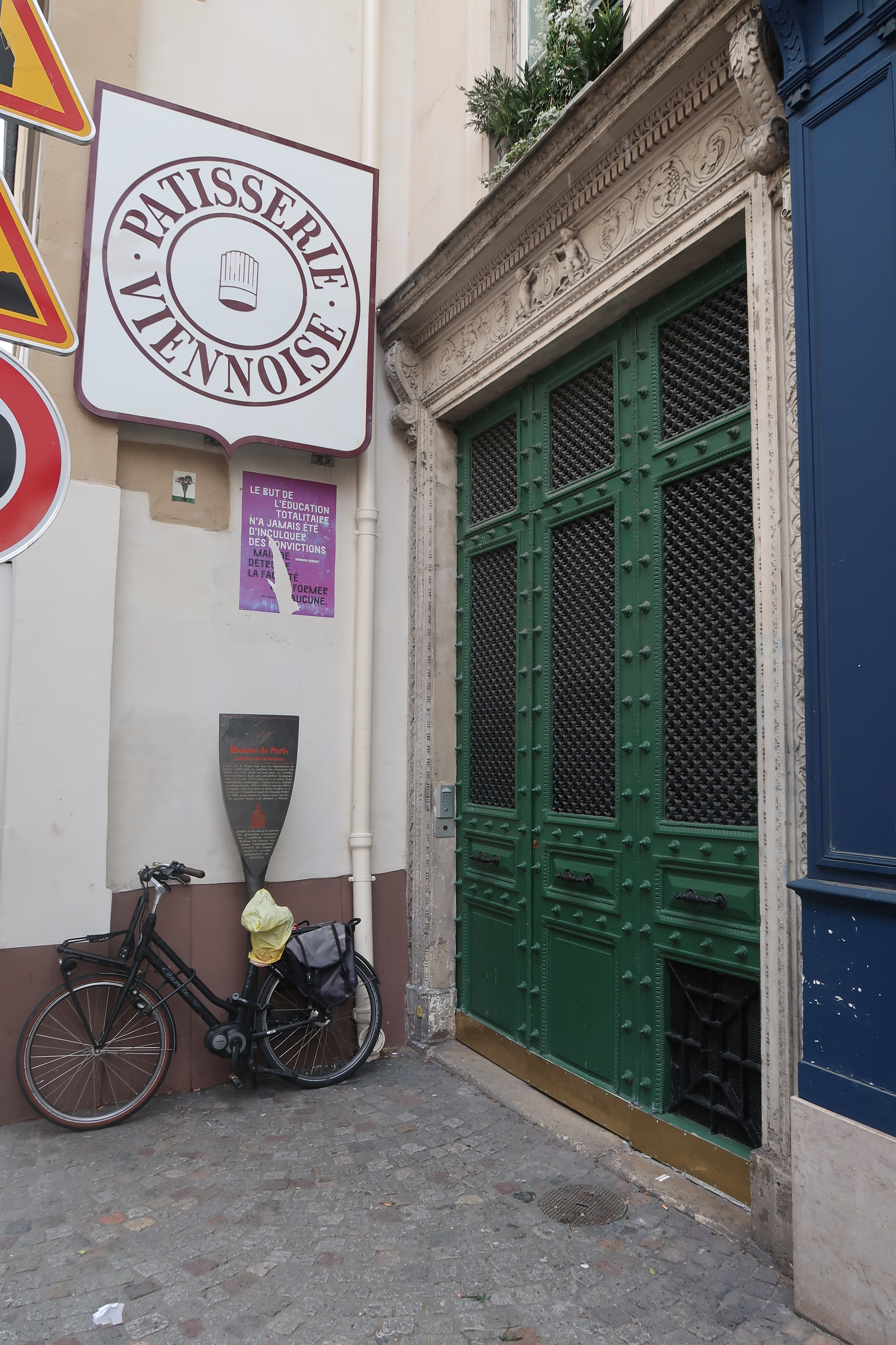 Panneau Histoire de Paris pour la confrérie des Chirurgiens, 6 rue de l'École-de-Médecine (Paris, 6e).